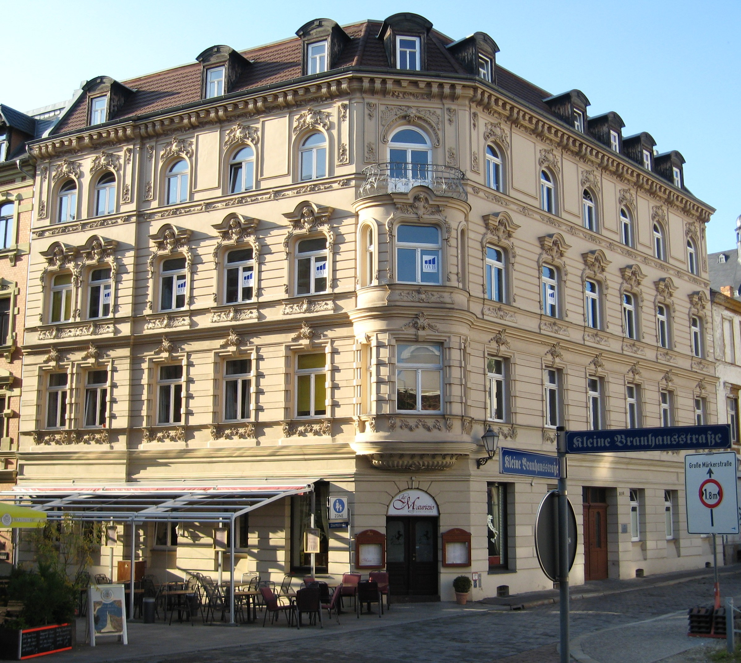 Haus Christian-Wolff-Straße 8 an der Kreuzung Sternstraße/Kleine Brauhausstraße/Christian-Wolff-Straße in Halle (Saale).